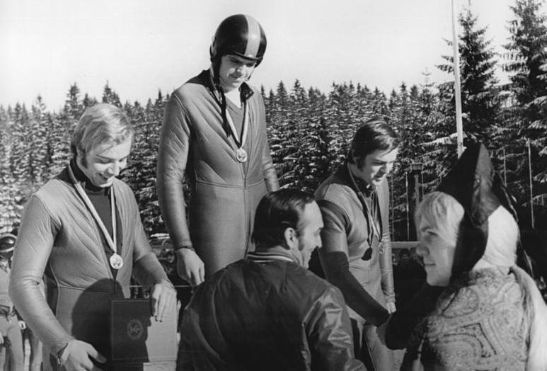 ADN-ZB Wendorf 4.2.1973-Oberhof: DDR-Meisterschaften im Rennschlittensport-Siegerehrung im Herren-Einsitzer: vlnr: Wolfram Fiedler vom SC Traktor Oberwiesenthal (2. Platz), Hans Rinn vom ASK Oberhof (1. Platz) und Harald Ehrig ebenfalls vom SC Traktor Oberwiesenthal (3. Platz).